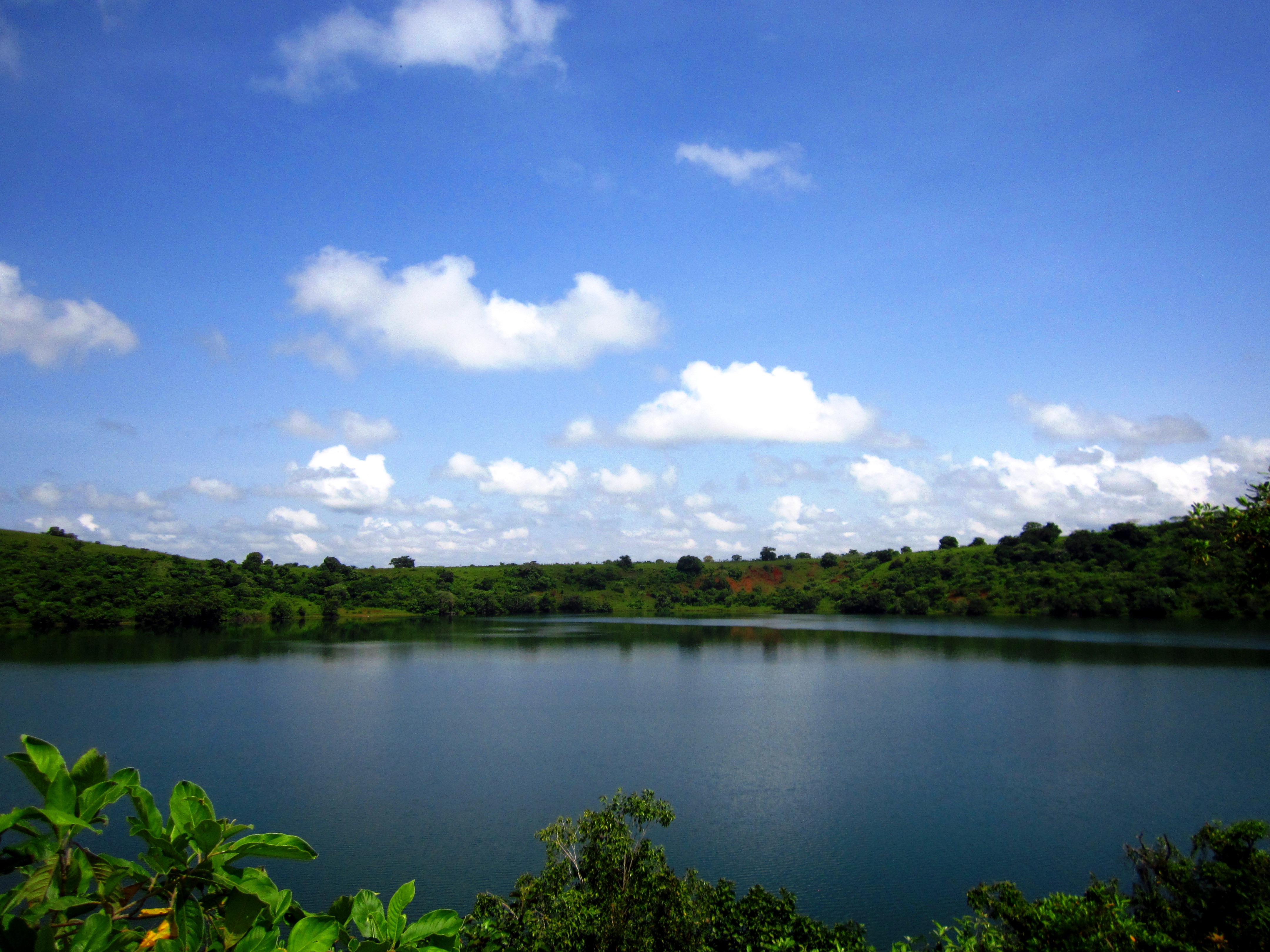 Lac de cratère de Mballang dans la région de L'Adamoua, situé à une trentaine de km de N'Gaoundéré